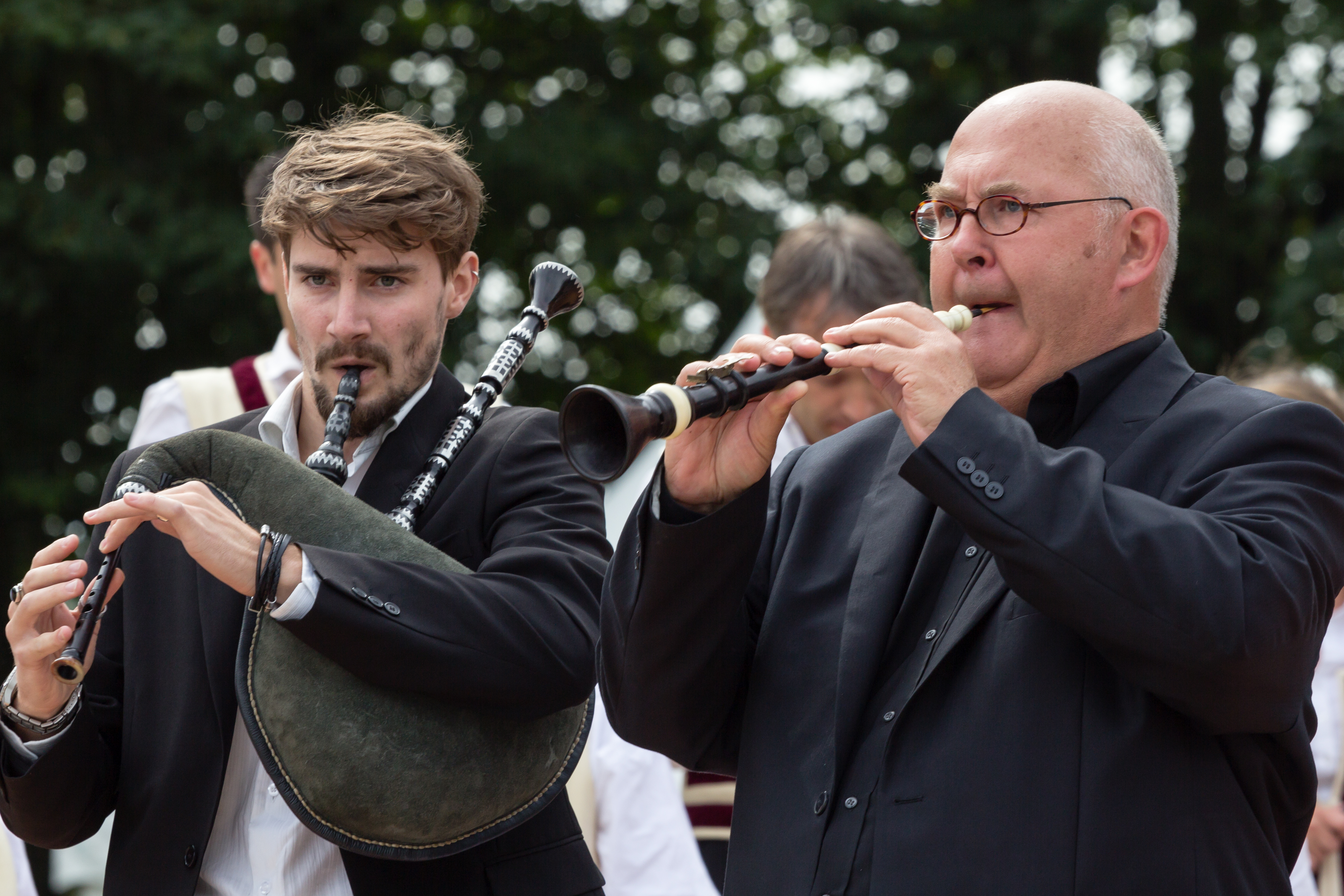 Le bagad Elven lors du championnat national des bagadoù (deuxième catégorie) au FIL 2012.